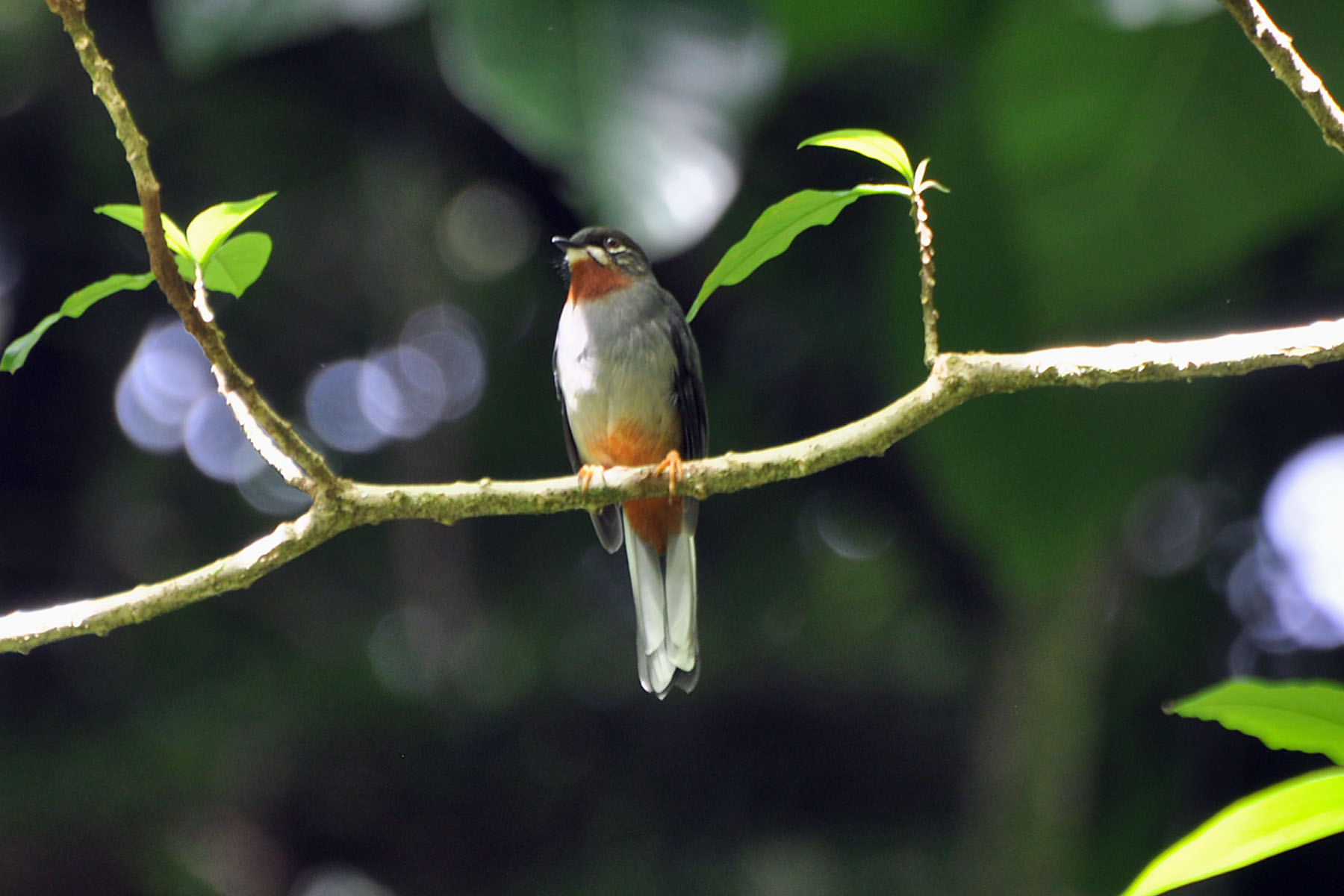 Myadestes genibarbis dominicanus 8 nov 11 Dominica, West Indies